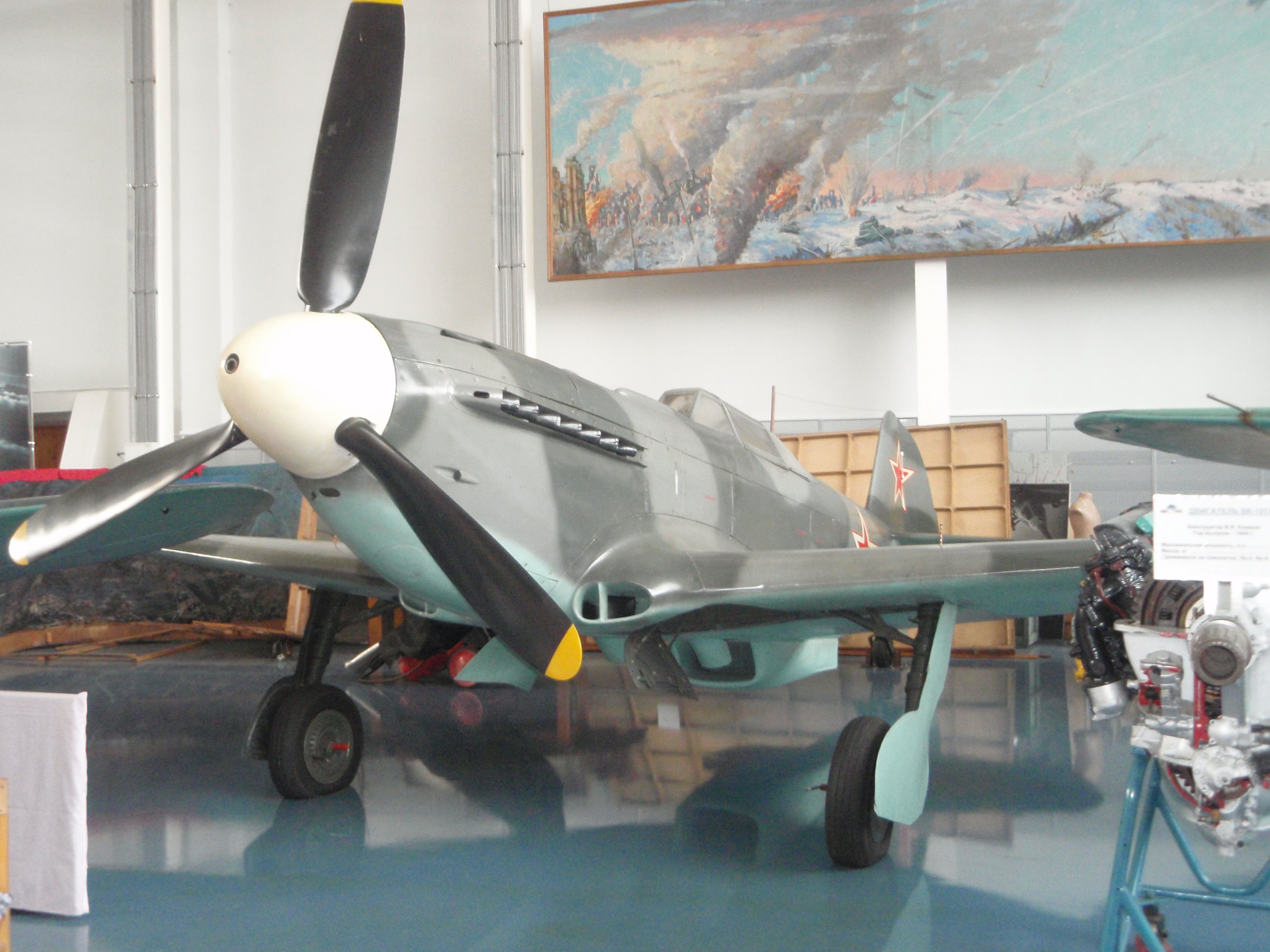 Советский истребитель Як-9У